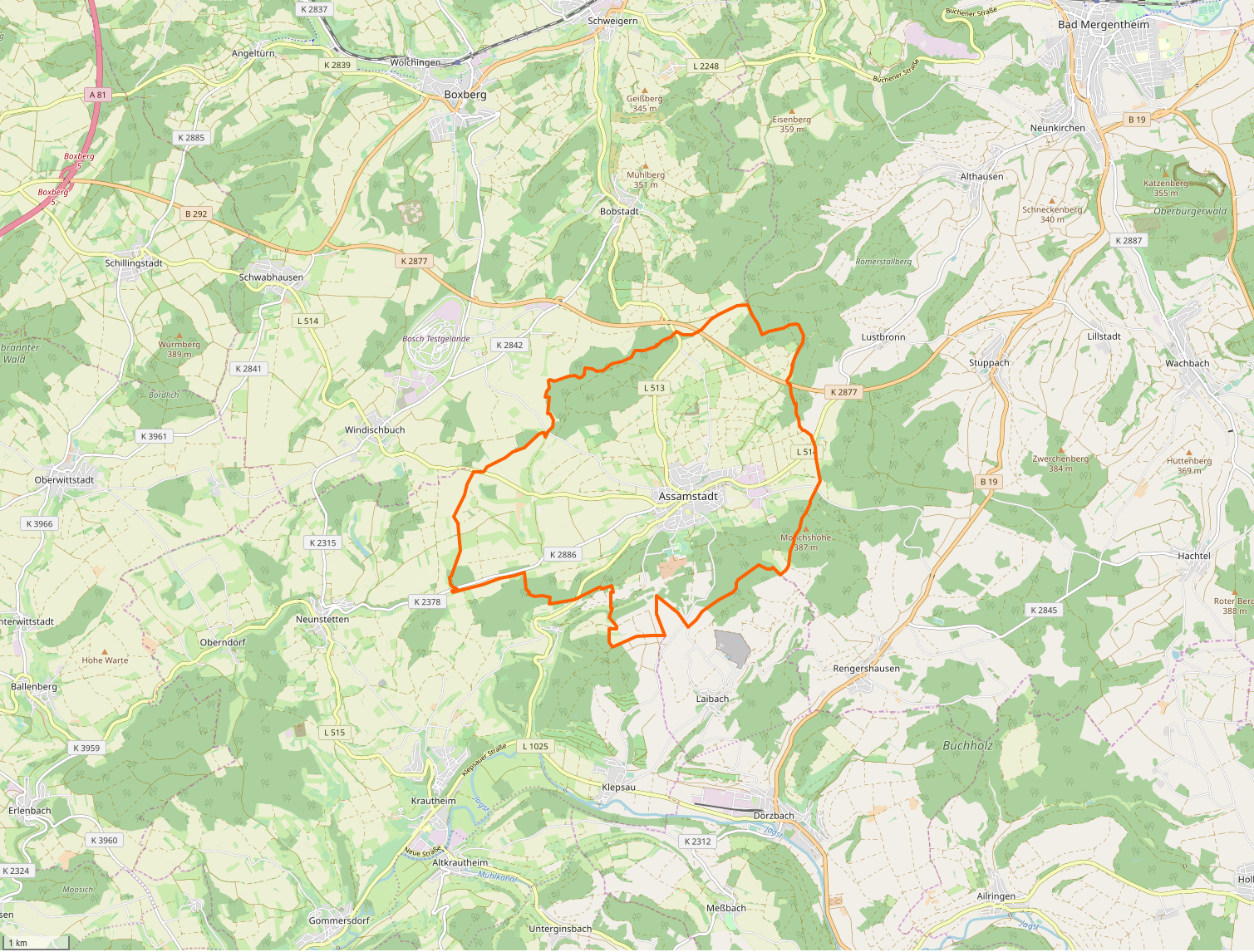 Gemarkung und Lage der Gemeinde Assamstadt. Siehe auch: Liste der Kulturdenkmale in Assamstadt. Liste der Straßennamen von Assamstadt. Gemarkungen und Lagen der Städte und sonstigen Gemeinden im Main-Tauber-Kreis: Ahorn · Assamstadt · Bad Mergentheim · Boxberg · Creglingen · Freudenberg · Großrinderfeld · Grünsfeld · Igersheim · Königheim · Külsheim · Lauda-Königshofen · Niederstetten · Tauberbischofsheim · Weikersheim · Werbach · Wertheim · Wittighausen